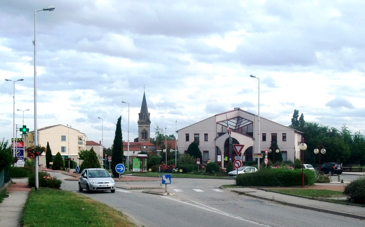 Davézieux centre mairie